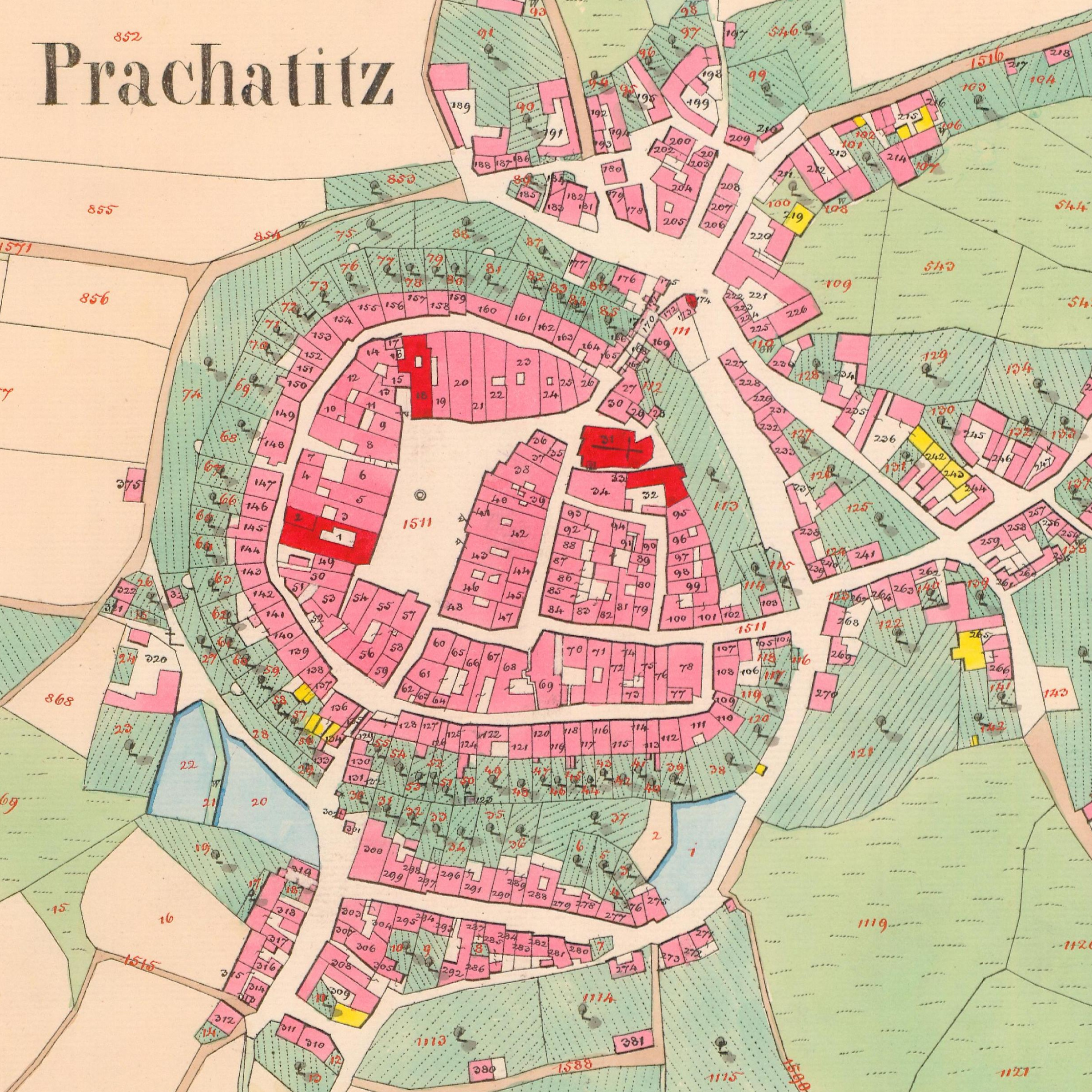 Prachatice na císařském otisku mapy Stabilního katastru. Detail centra. Mapový list 6076-1-004, vydáno 1837.